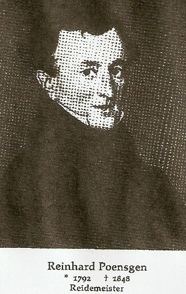 Scan eines Portraitbildes